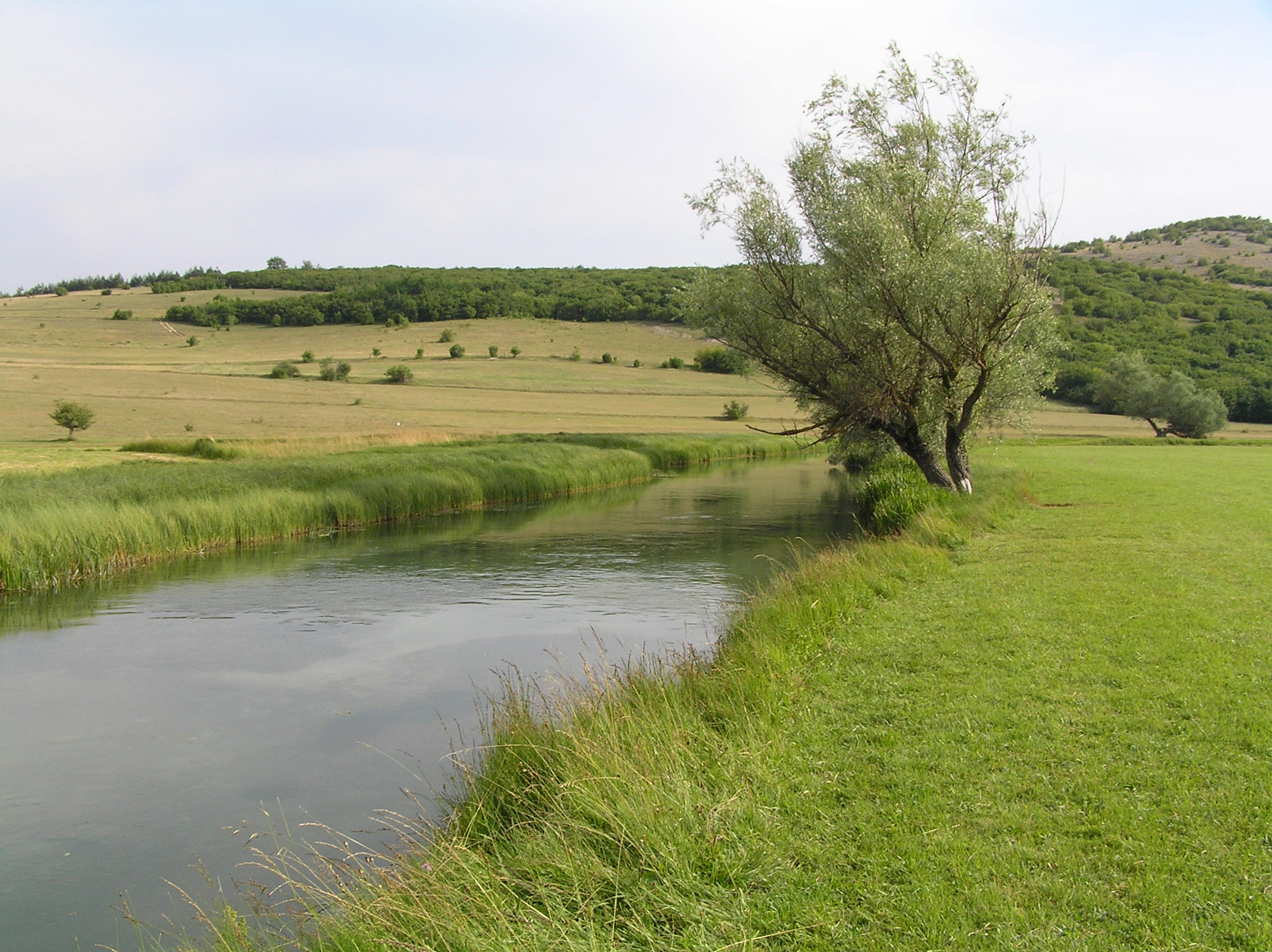 Rijeka Sturba